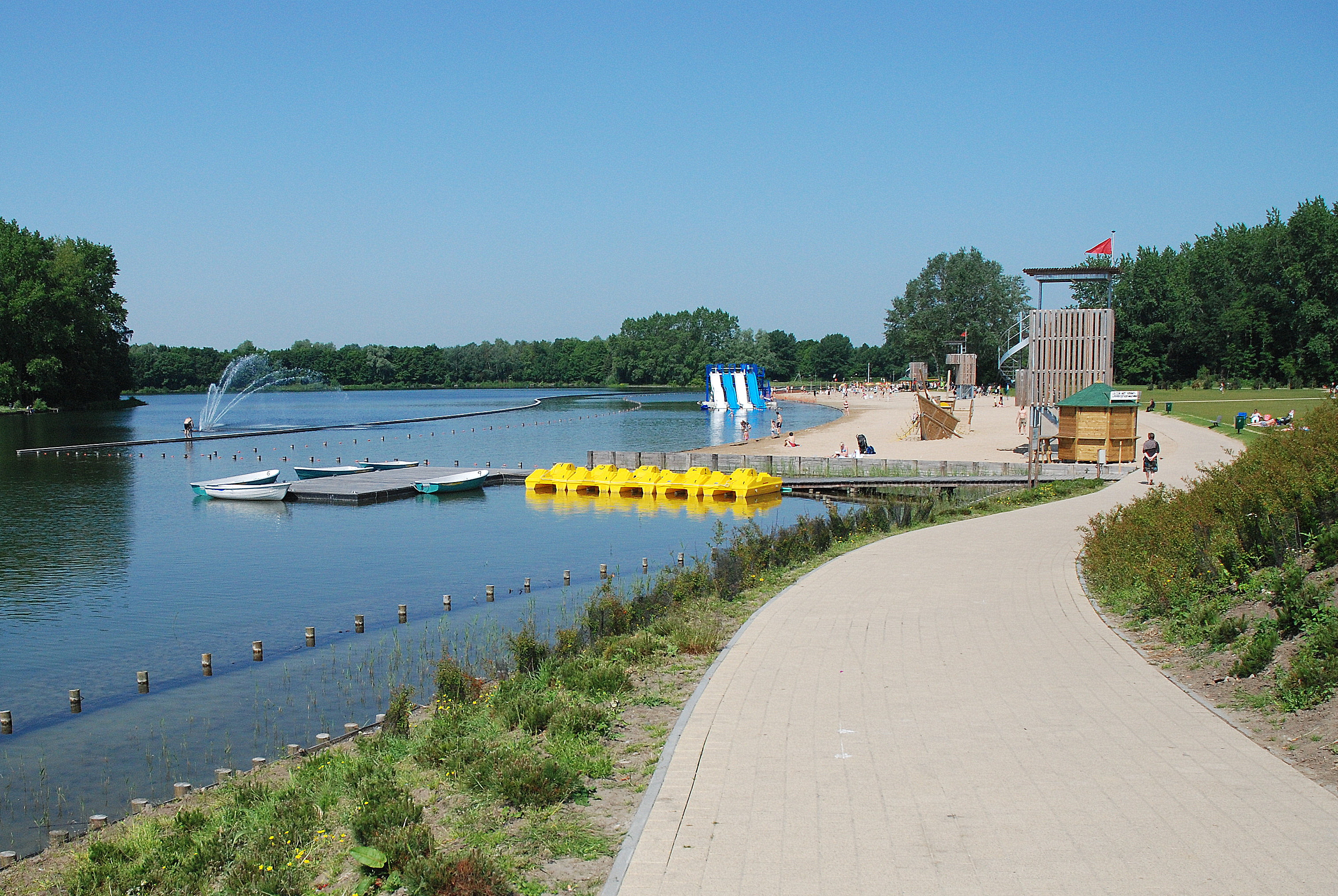 Blaarmeersen te Gent, België